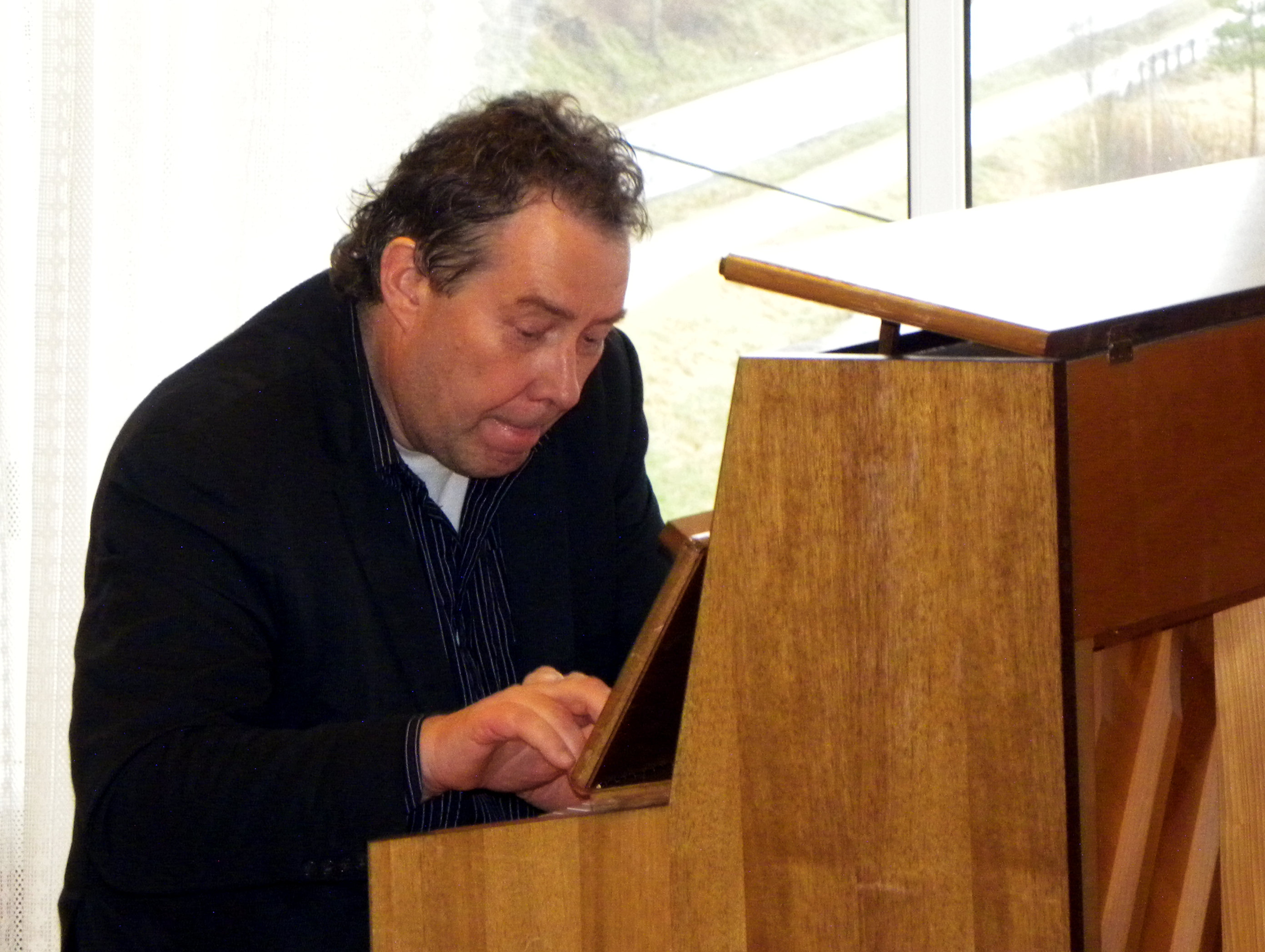 Alfred Gammelsæter er en norsk komponist og pianist. Her fotografert under forestillingen «Høre månen» på Iveland Bygdeheim.